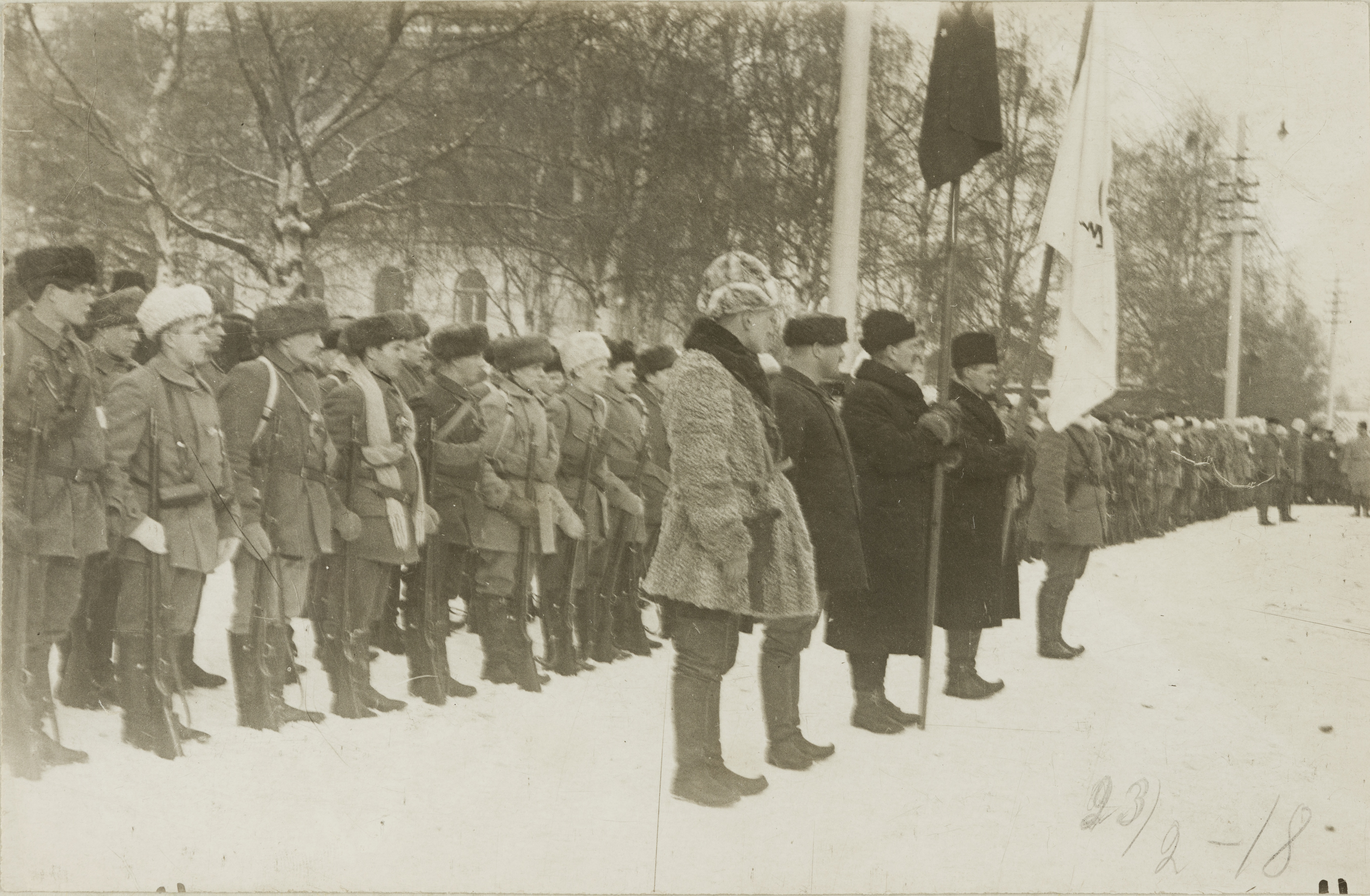 Oulun suojeluskunnan I komennuskunta kokoontuneena Oulun tuomiokirkon edustalle lähtökatselmukseen vuonna 1918.